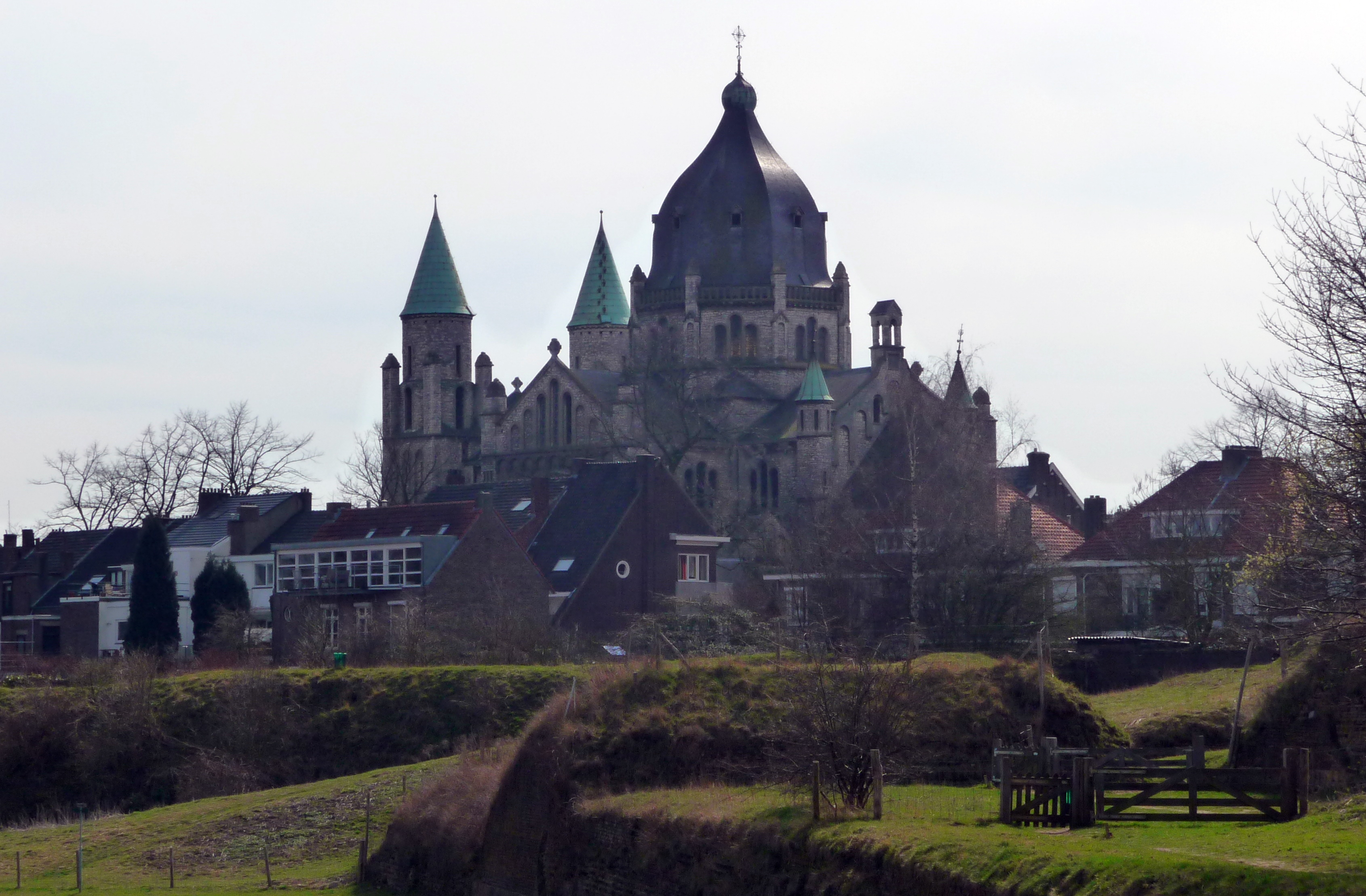 Own work Sint Lambertuskerk Maastricht